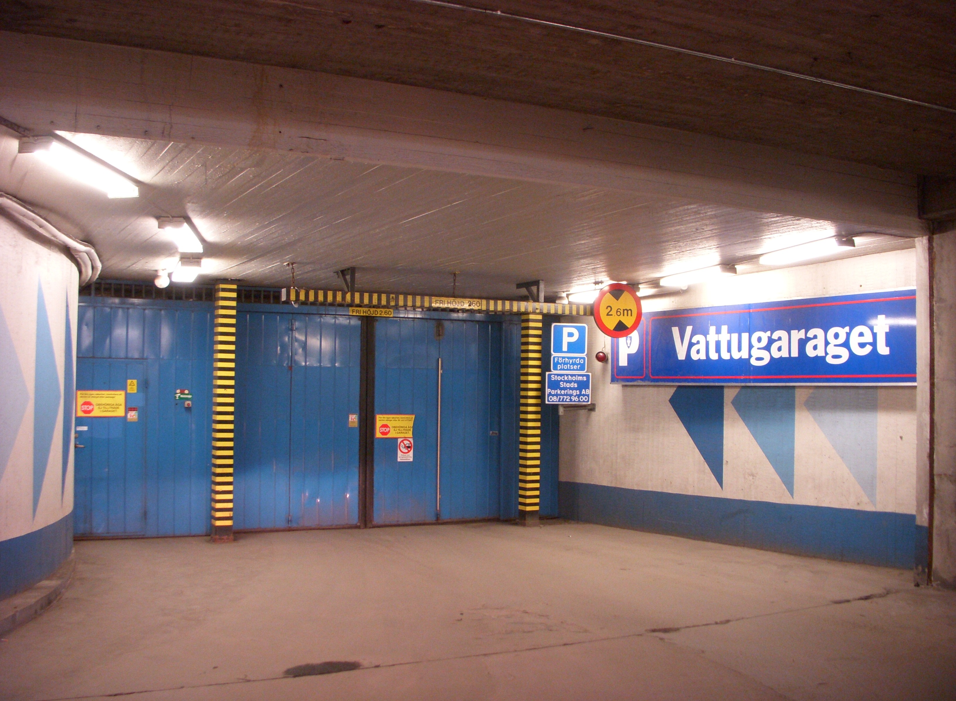 Infart till Vattugaraget i Stockholm, Norrmalm